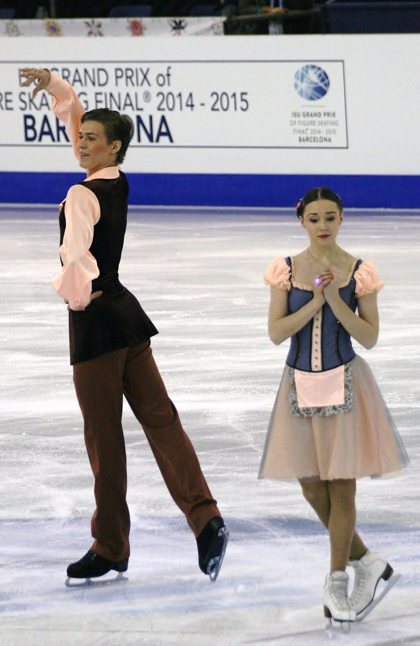 Алла Лобода и Павел Дрозд (Россия) на финале Гран-при среди юниоров 2014-2015.